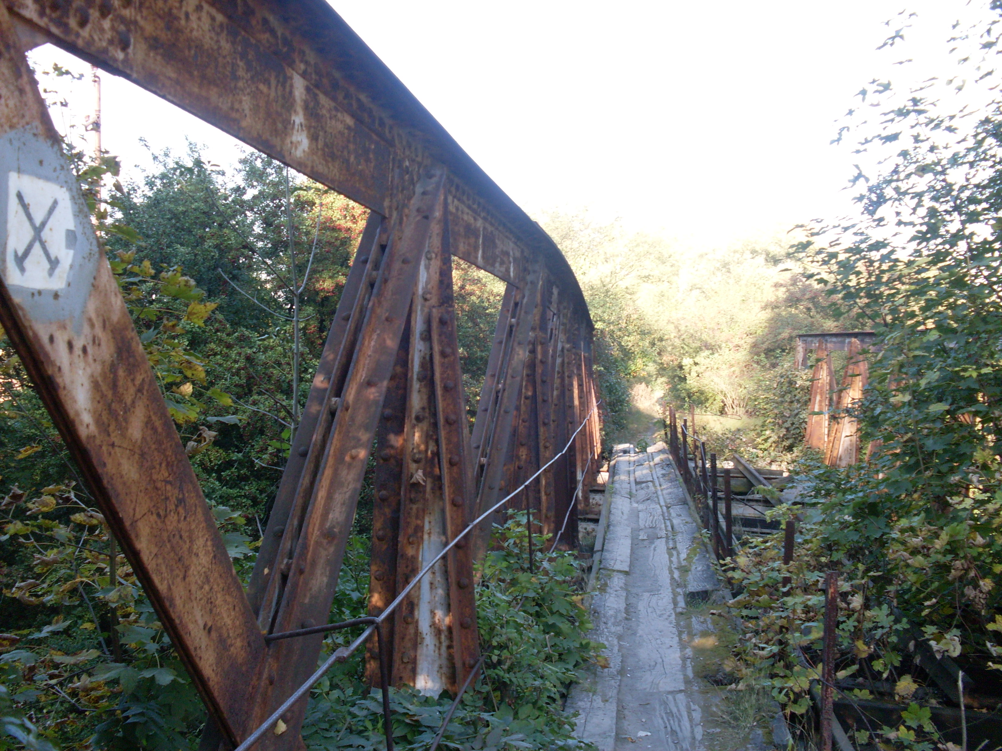 Krzeszowice.Gwoździec. Nieczynny most kolejowy na Krzeszówce